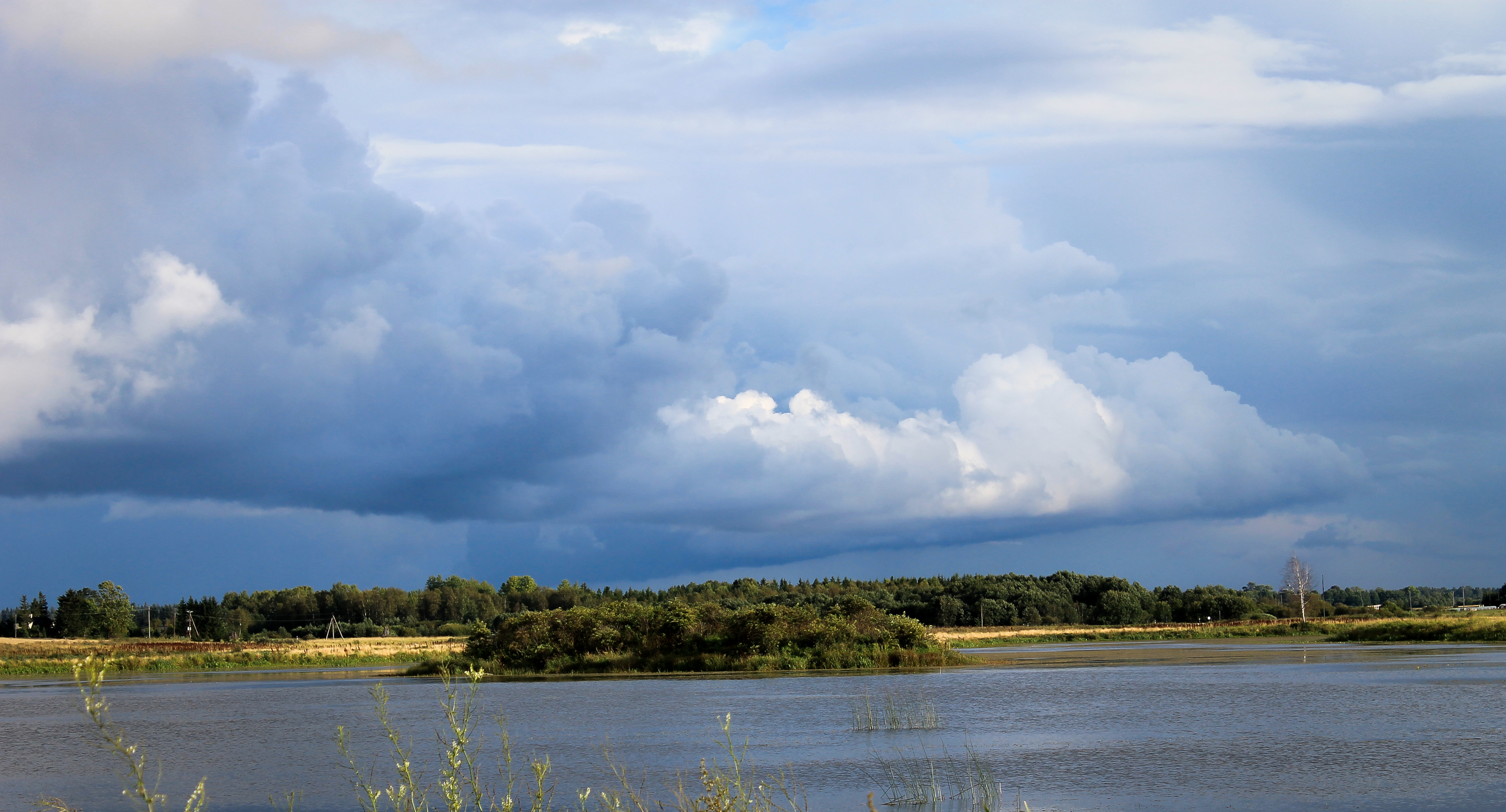 Kadrina paisjärv kuival suvel.